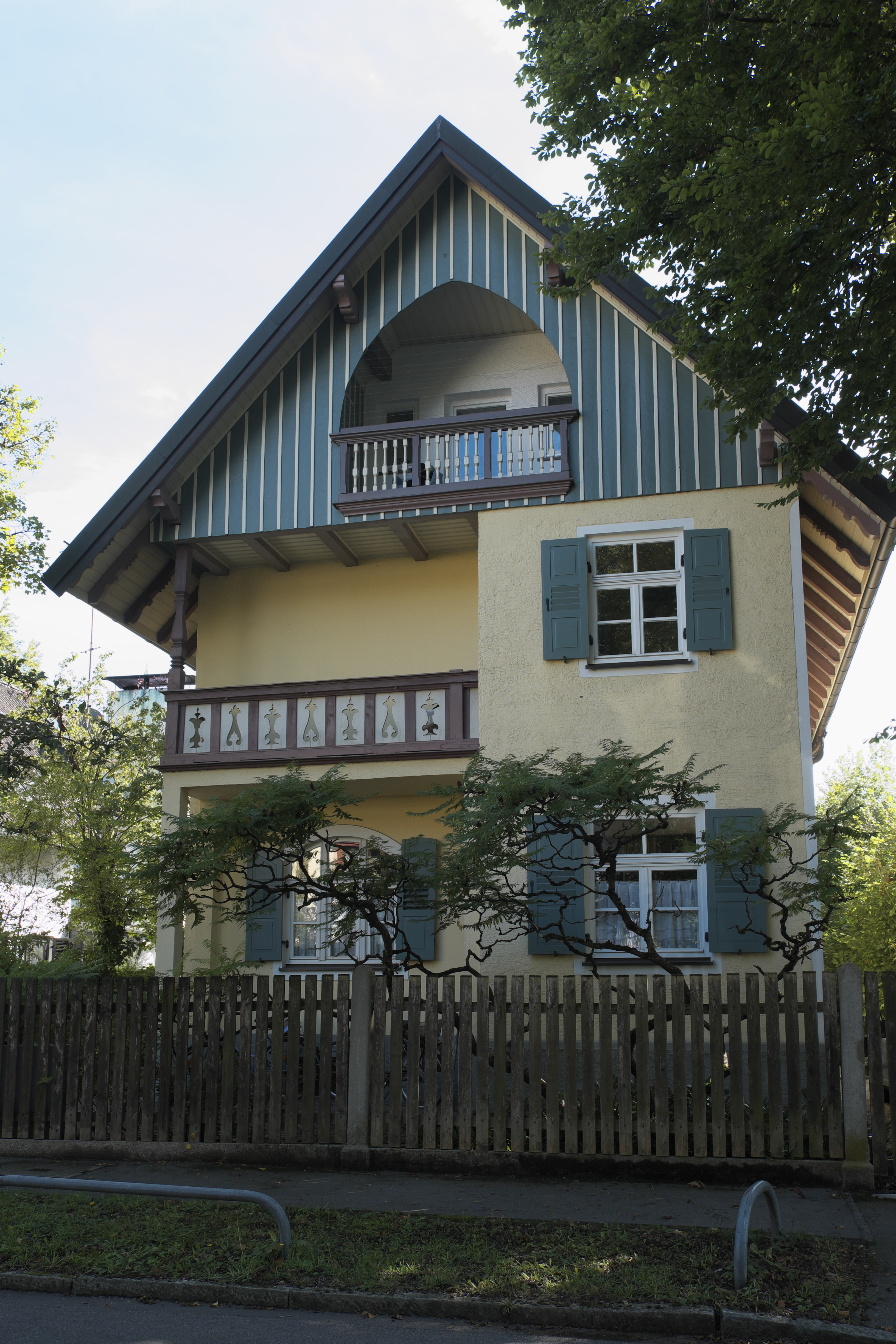 Villa, Apfelallee 3, in Obermenzing im Stadtbezirk Pasing-Obermenzing in München (Bayern/Deutschland), 1900 erbaut